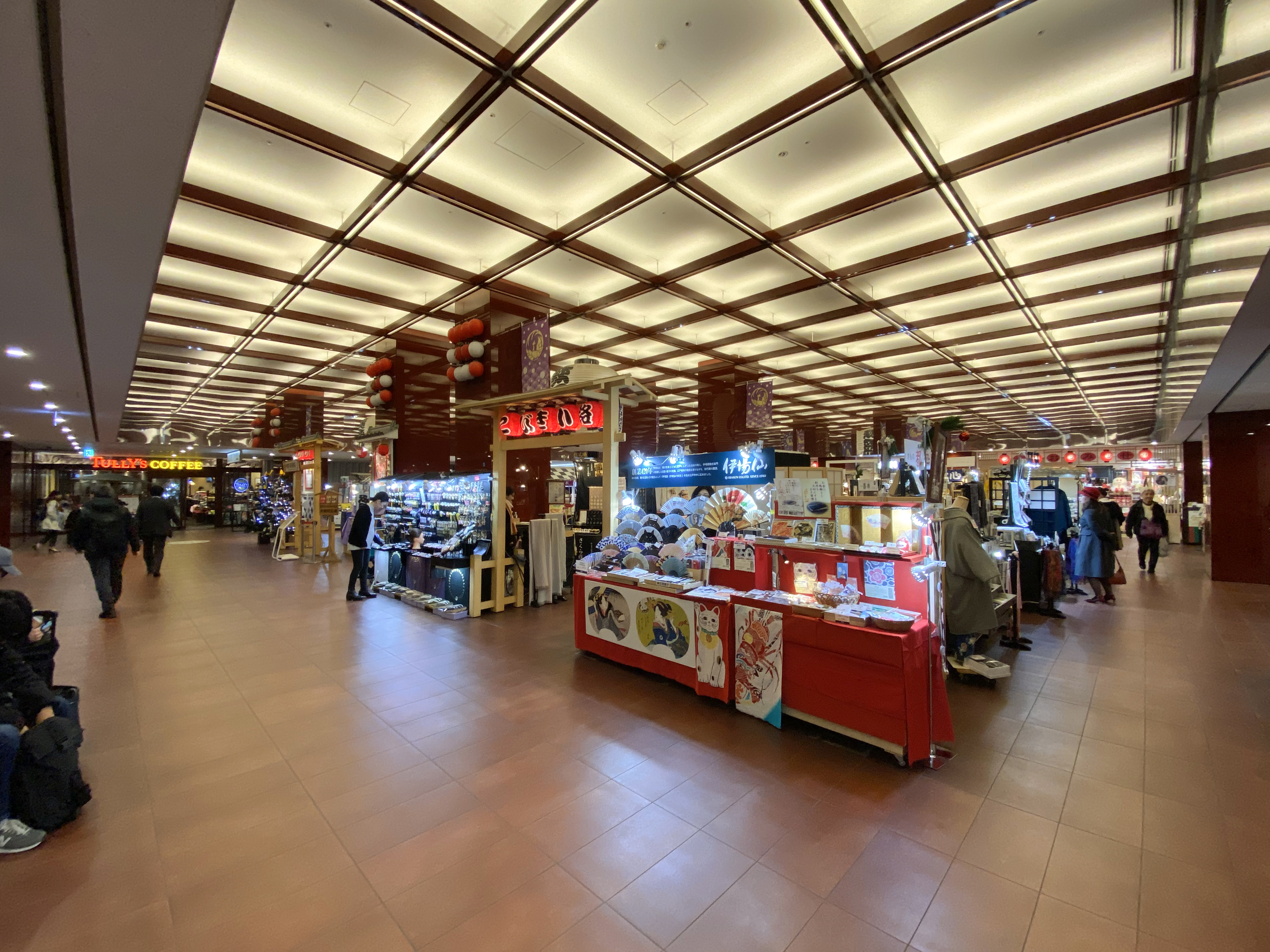 歌舞伎座木挽町広場